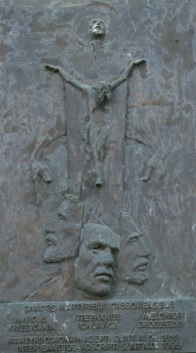 Kassai vértanúk emléktáblája Kassán